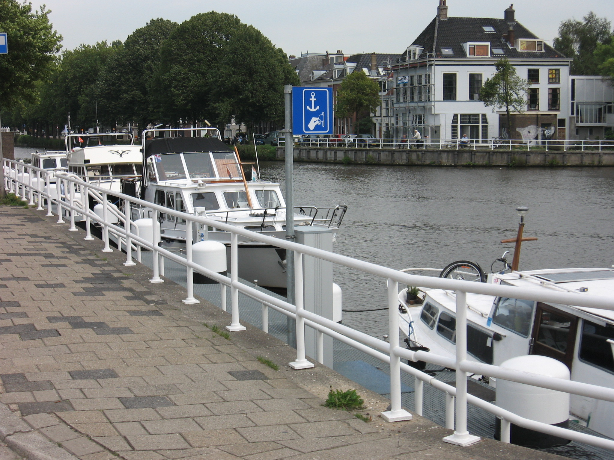 Betaald parkeren voor boten, Delft